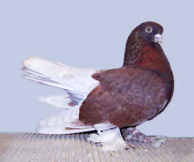 Kazaner Tumbler (Red)